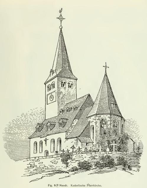 Stich der katholischen Pfarrkirche von Meudt im Jahr 1908 vor dem Teilabriss und Neubau